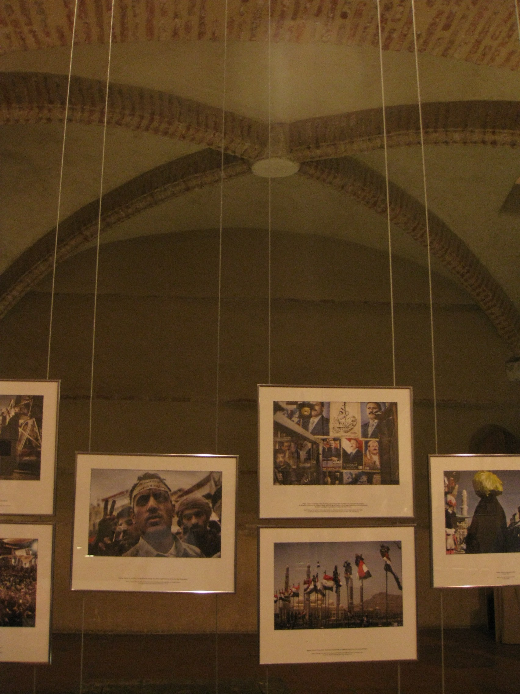 Església de Sant Domènec (Perpinyà), exposició de fotos durant el certamen Visa Pour l'Image a la nau gòtica del convent; al fons, volta de creueria d'una de les capelles .